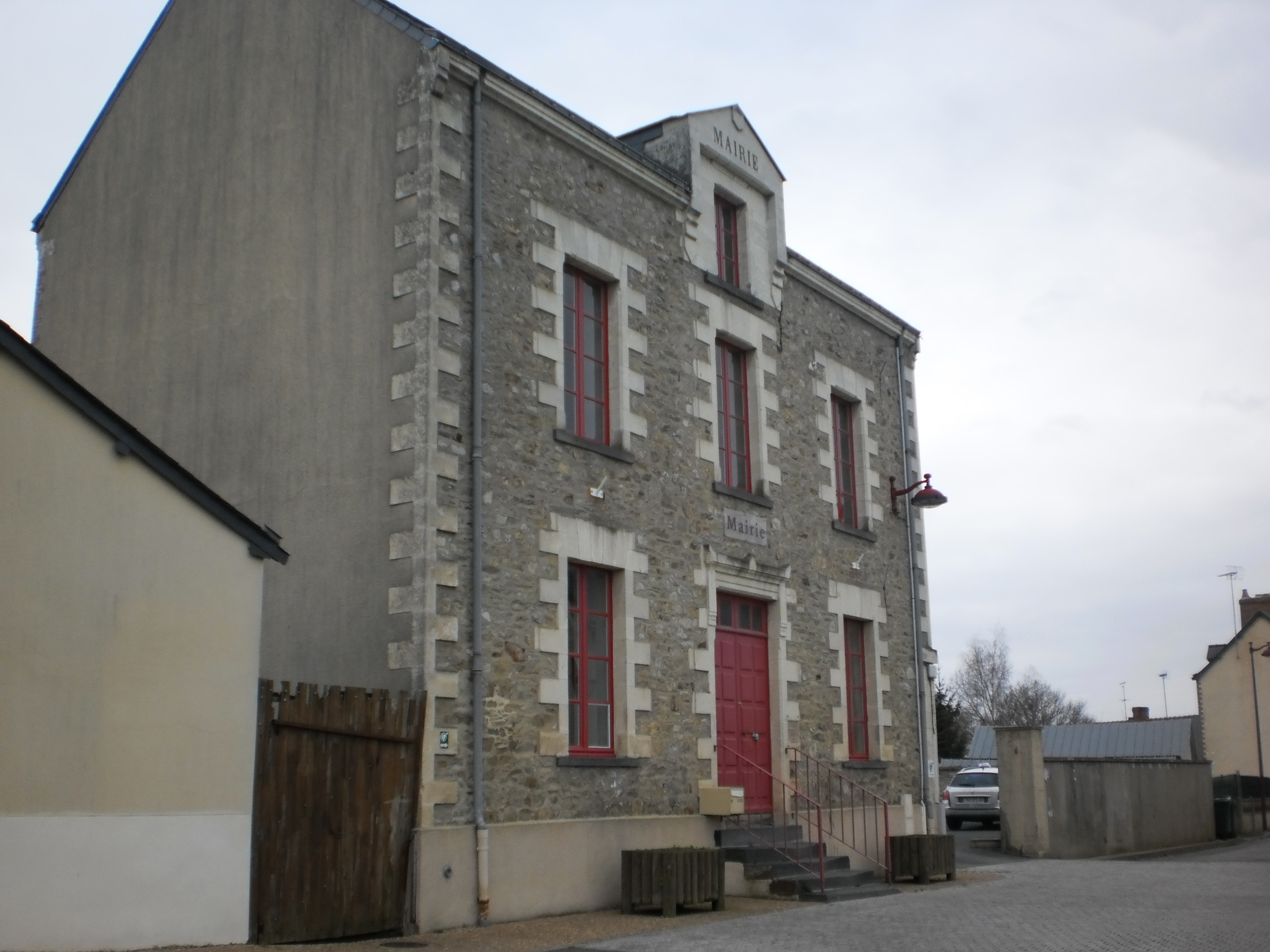 Noyal-sur-Brutz (Loire-Alantique, France) - mairie